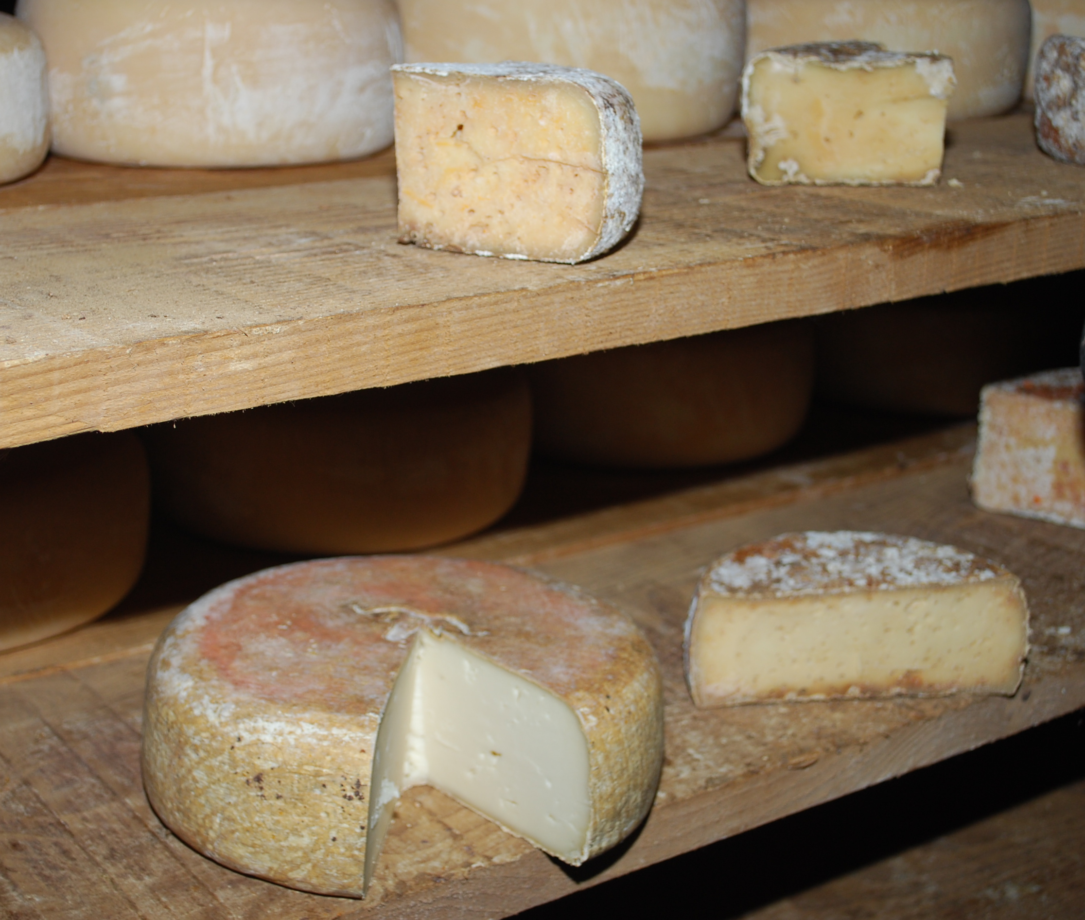 Fromages Ossau-Iraty (saloir de A&Y Perret) à Monein (Pyrénées-Atlantiques). Divers stades de maturation.